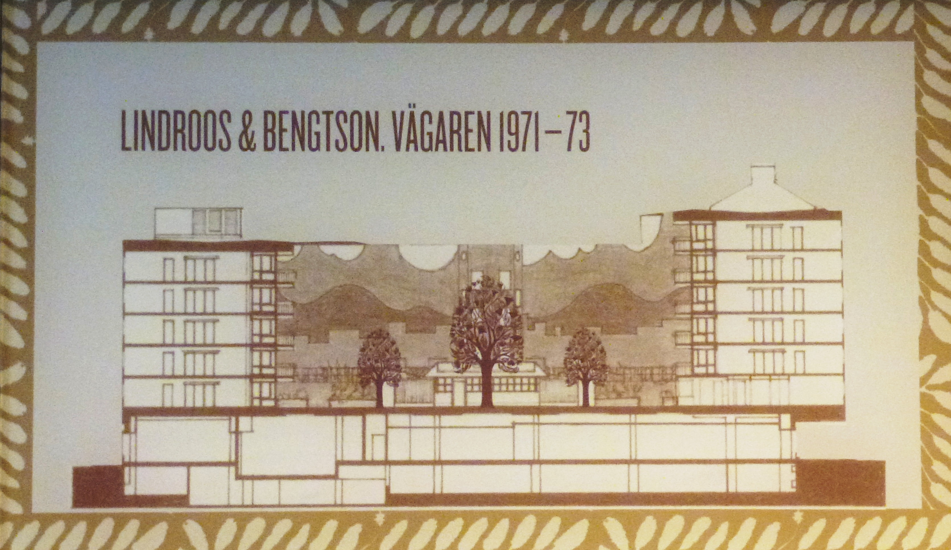 Vägaren 23, del av konstverk, arkitekt Bengt Lindroos